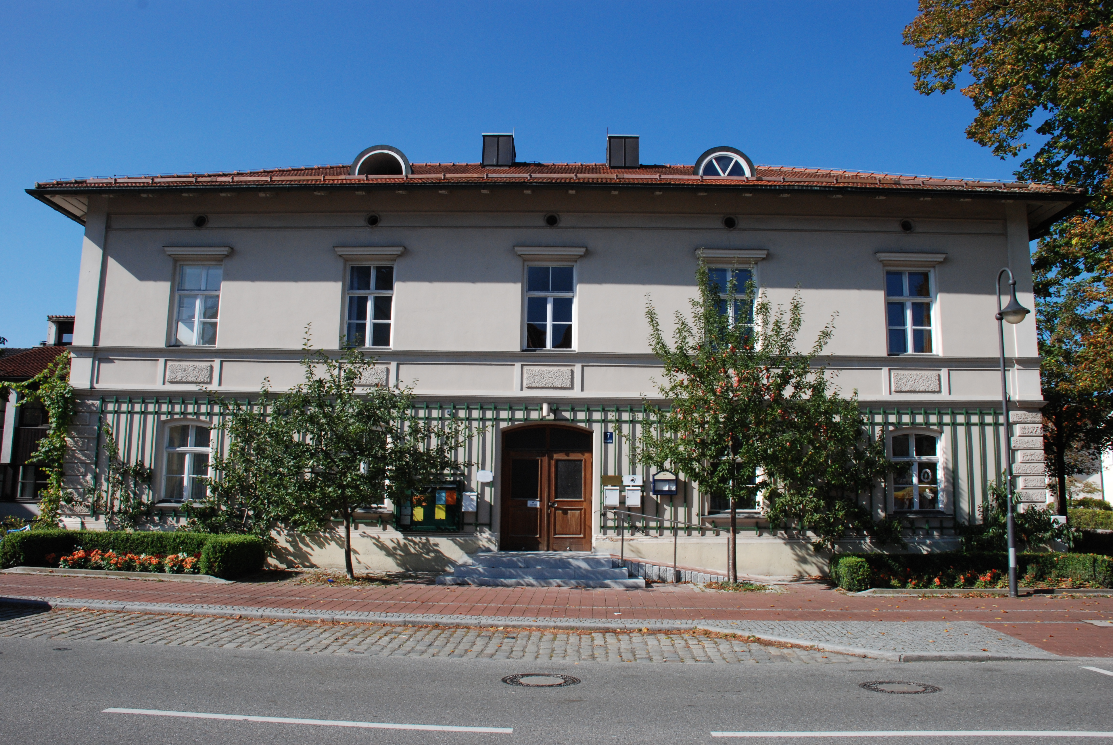 Alte Schule in Sauerlach, Landkreis München, Regierungsbezirk Oberbayern, Bayern. Jetzt kommunales Vereinshaus. Als Baudenkmal in der Bayerischen Denkmalliste aufgeführt.